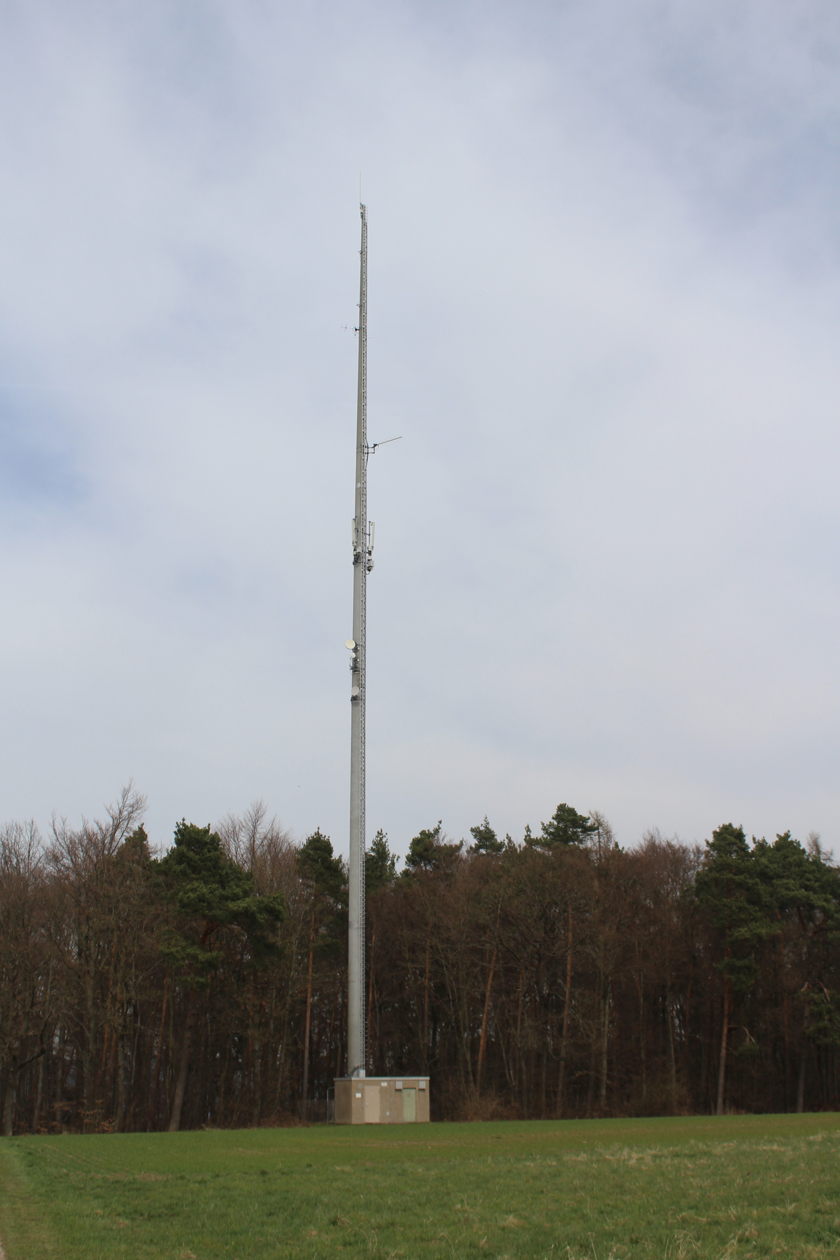 Sendeturm Sender Rauenberg